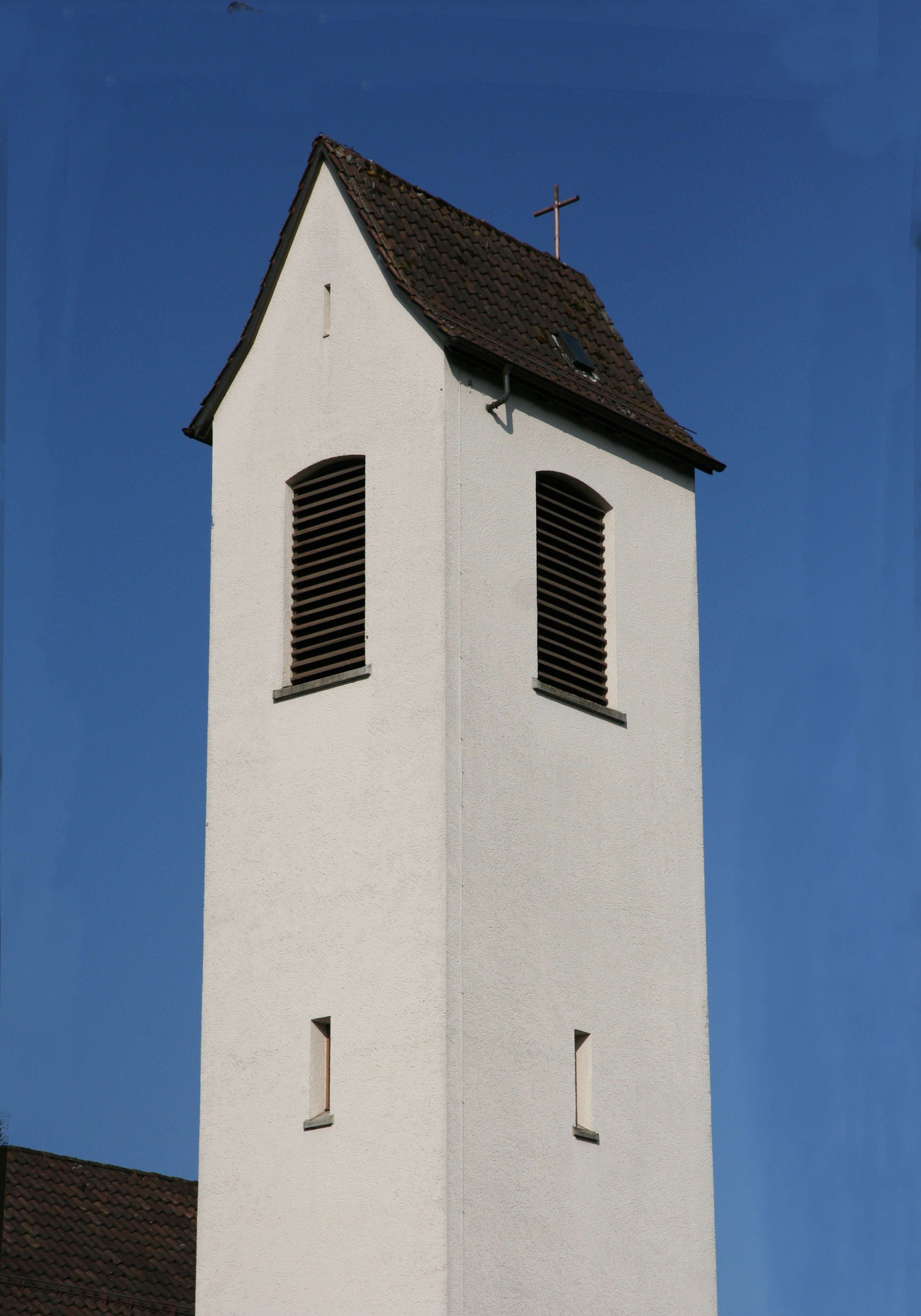 Römisch-katholische Pfarrkirche St. Verena Stäfa